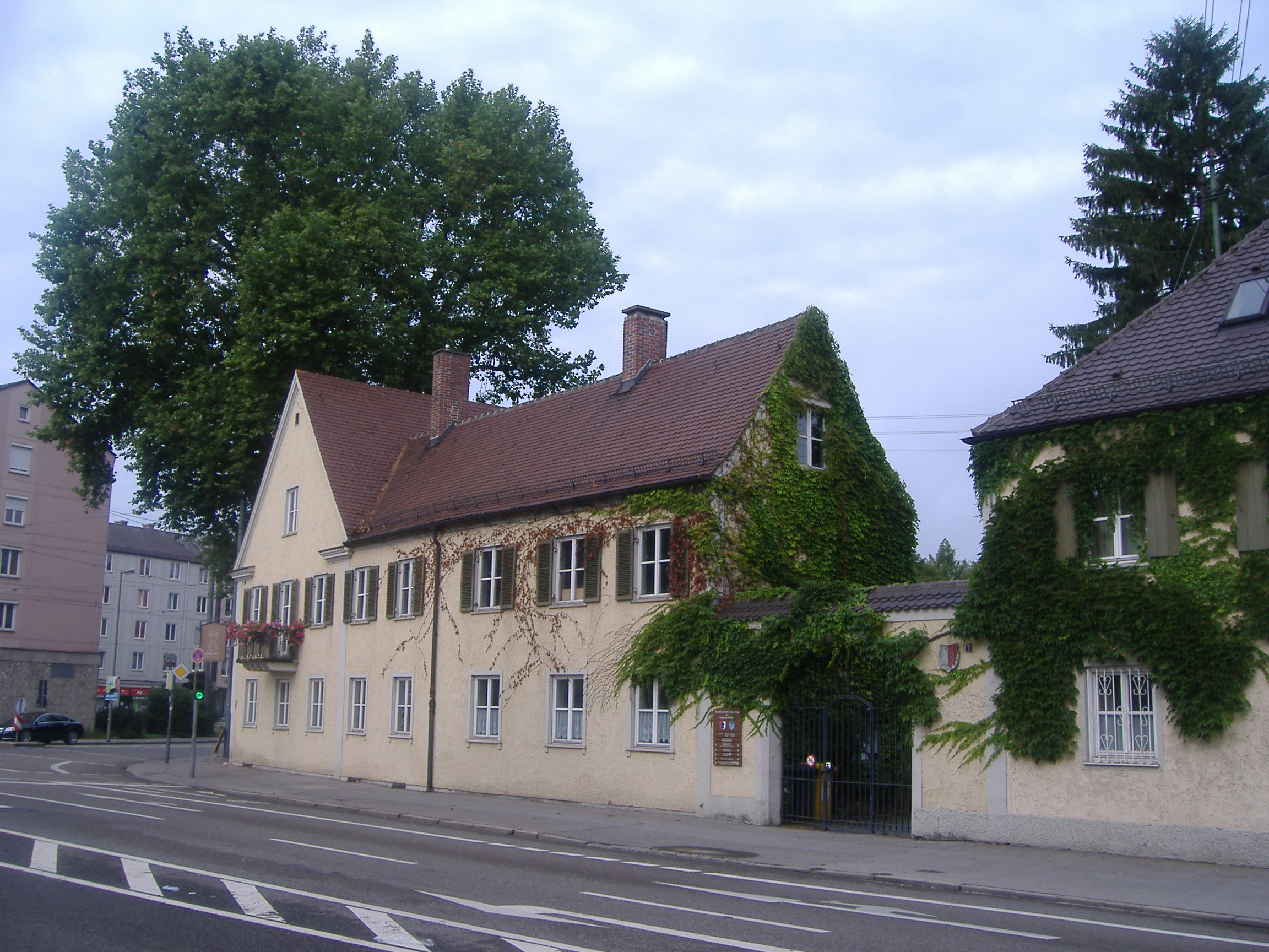 Vorderfront des Fugger-Schlösschens in Göggigen